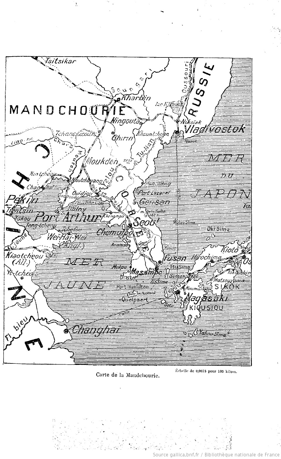 Carte de Mandchourie, de la Corée, de la mer Jaune, etc. In Adrien Launay M.E.P., La Mission de Mandchourie, Tours, Mame & fils, 1905.